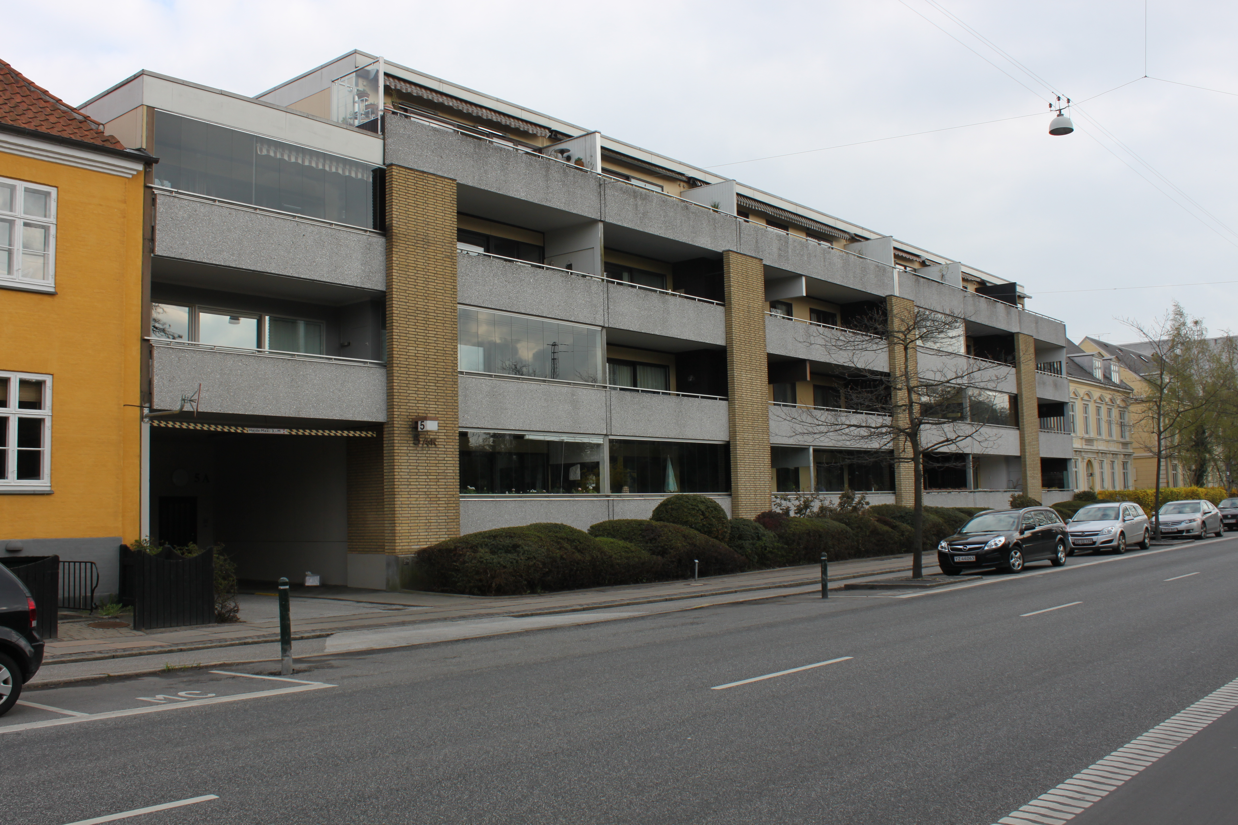 Slotsgården, Pile Allé 5, DK-2000 Frederiksberg, Denmark. Build 1975. Architect Svend Fournais.